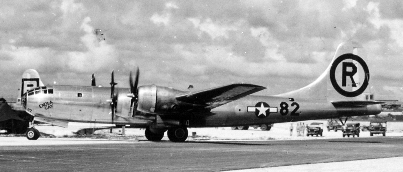 Enola Gay